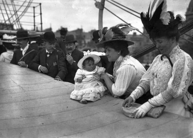 Mme Charcot et son bébé sur le pont du Pourquoi Pas, 15 août 1908 (photographie de presse)